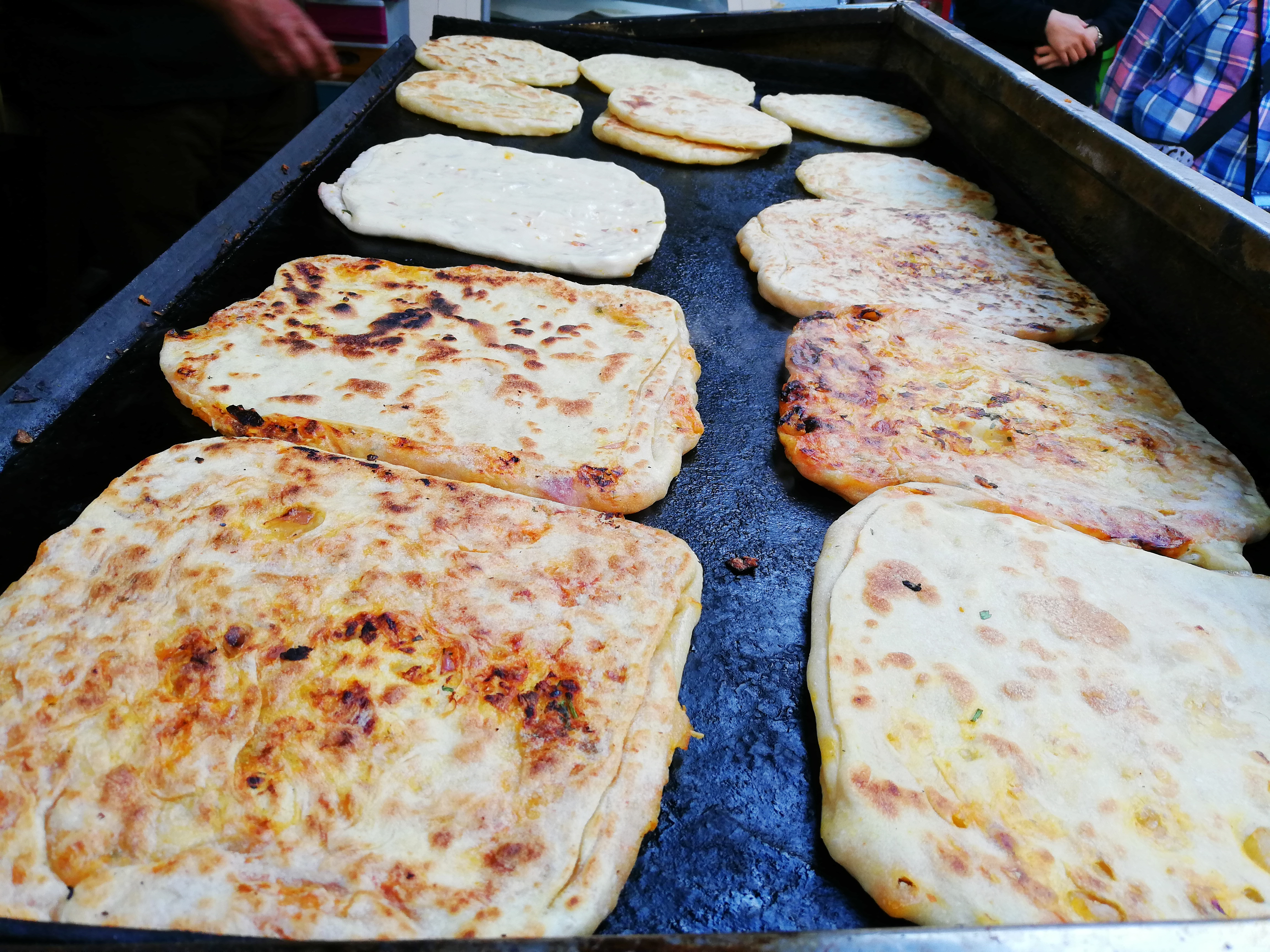 Msemmems en train de cuire.